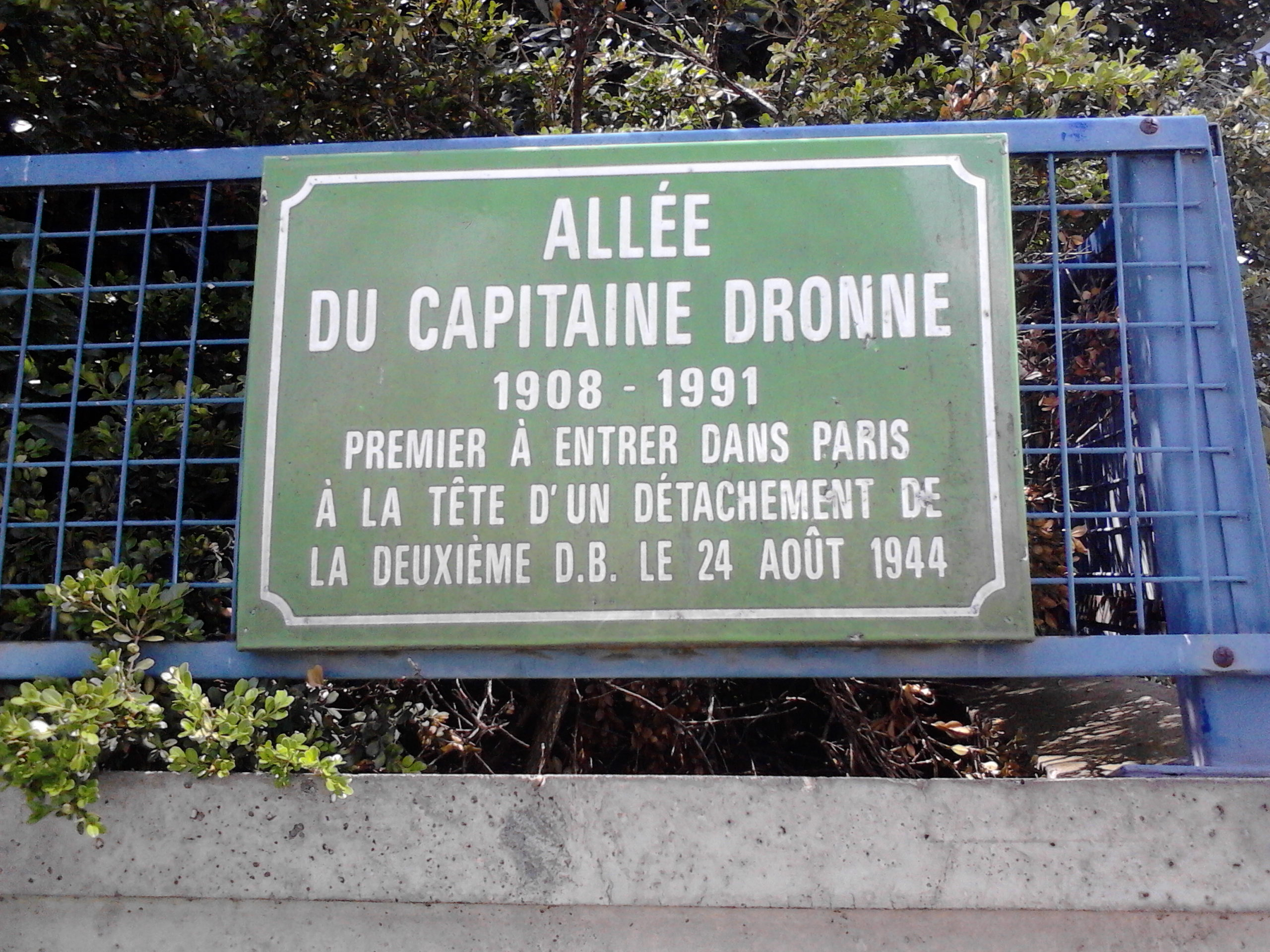 Plaque de rue allée du Capitaine Dronne à Paris